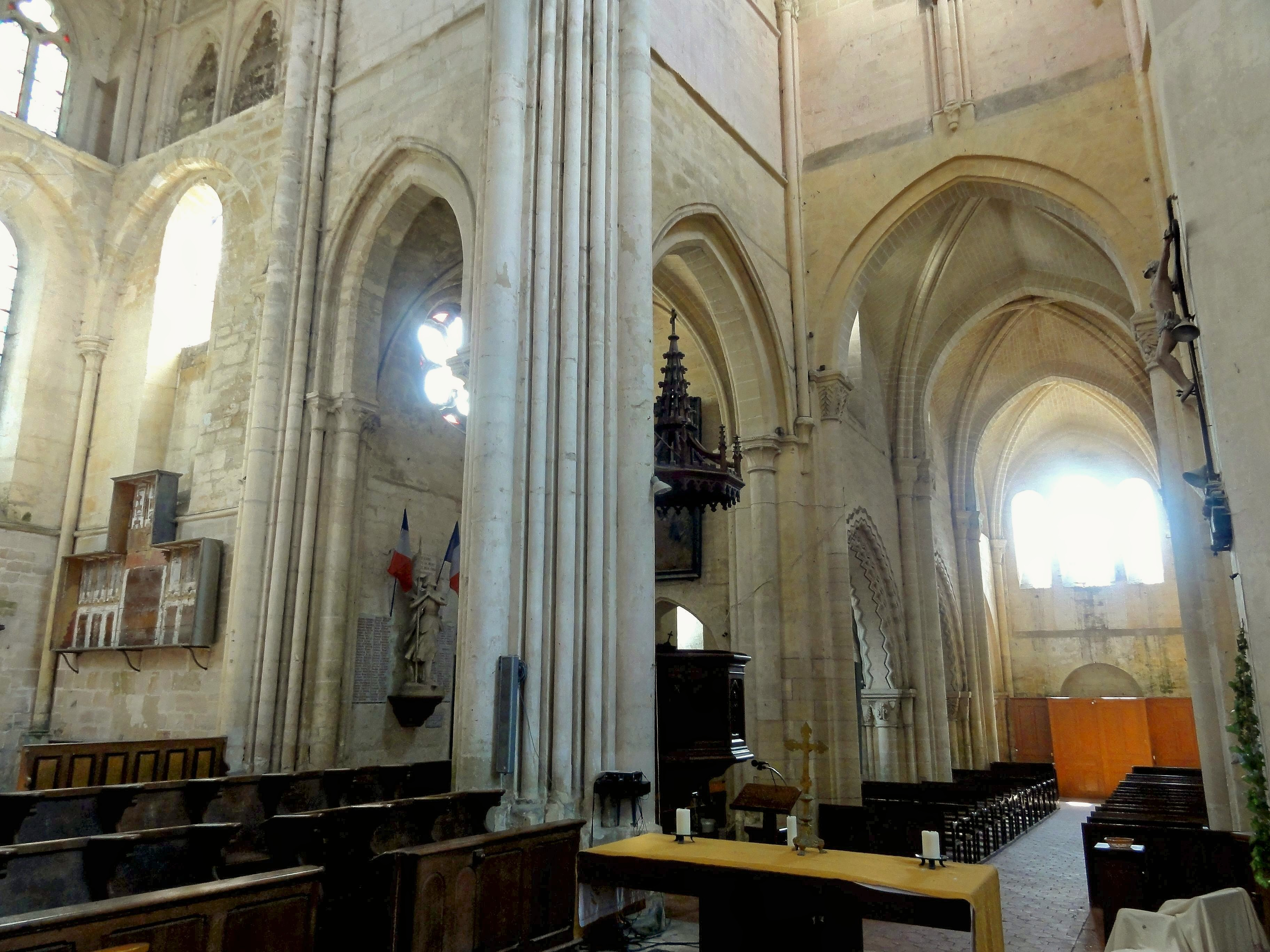 Croisée du transept, vue vers le sud-ouest.